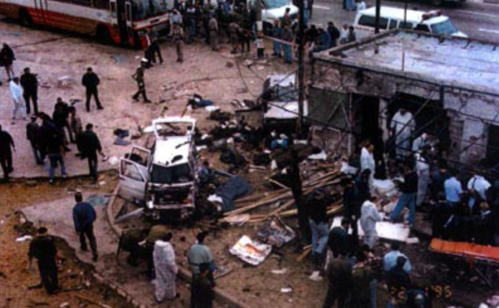 הפיגוע בצומת בית ליד.